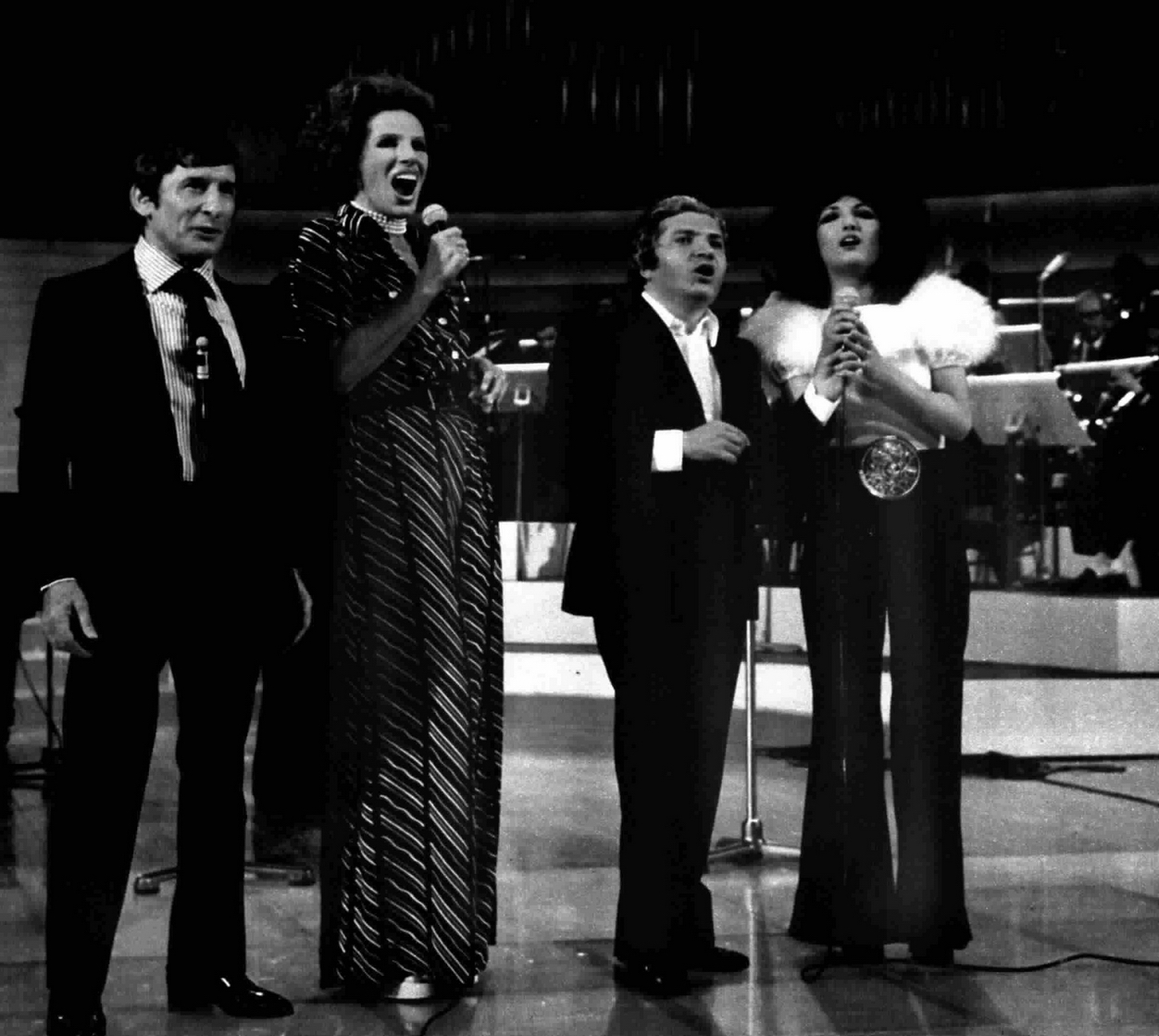 Renato Rascel, Ornella Vanoni, Bruno Lauzi, Marcella Bella, guests of the Italian show Senza rete, Naples, 1972